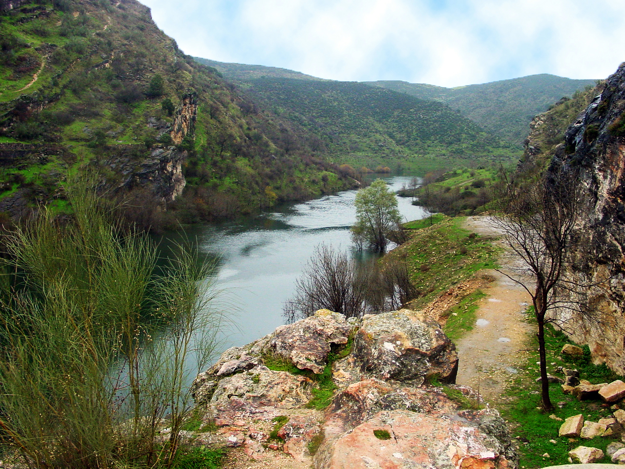 El eje principal del proyecto de abastecimiento de agua a Madrid era la construcción de una presa en el curso bajo del río Lozoya. El lugar elegido fue una garganta natural que los lugareños conocían como el "cerro de la Oliva", unos centenares de metros aguas arriba del encuentro con el río Jarama.